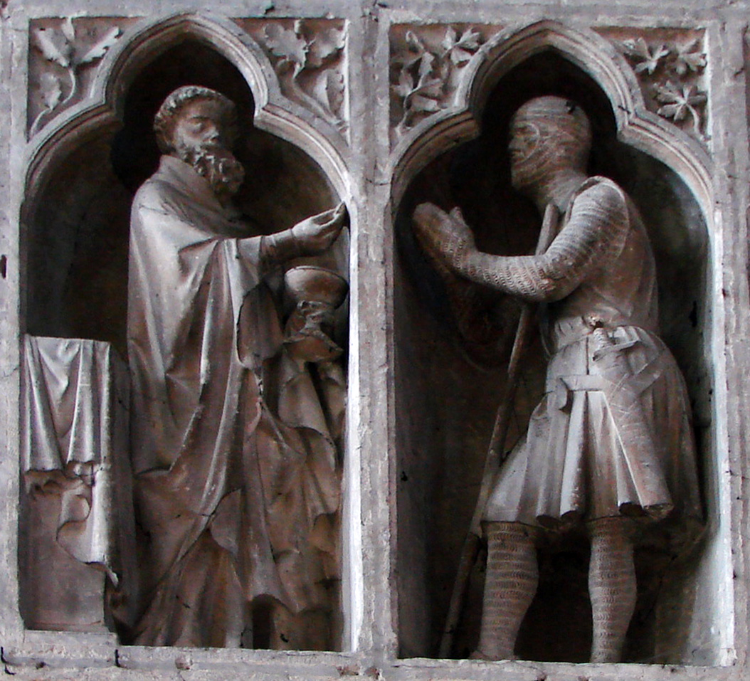 La scène de la "communion du chevalier"(perspective redressée)au revers de façade de la cathédrale de Reims.XIIIème siècle.